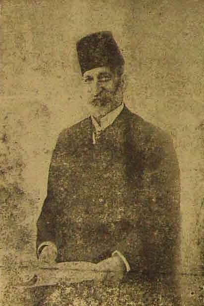 Menahem Saleh Daniel (1846-1940)